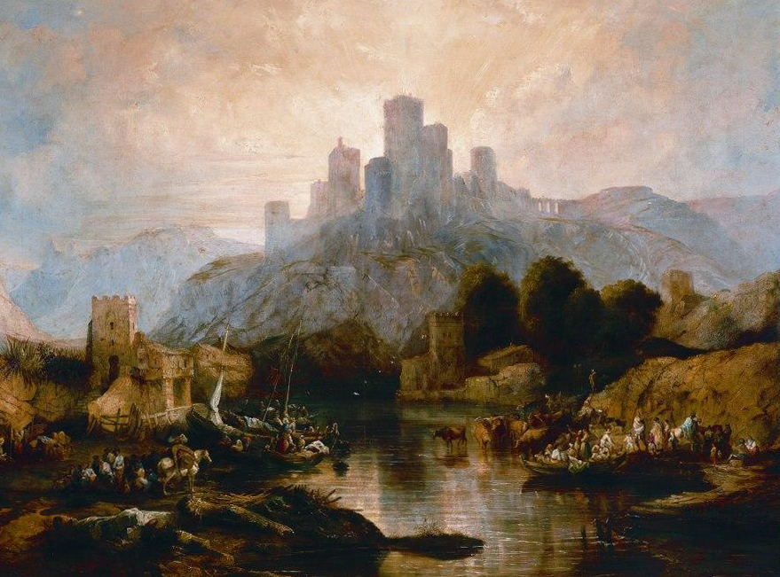 Jenaro Pérez Villaamil, Castillo de Alcalá de Guadaira. 1843. 110,5 x 145 cm, con marco: 138 x 171,5 x 7 x 14 cm, óleo sobre tela. Inv. 2801.